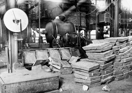 Kopperbarrer, vekt og konverter i gammelhytta. Sulitjelma. 1927 NM.F.008010-00013